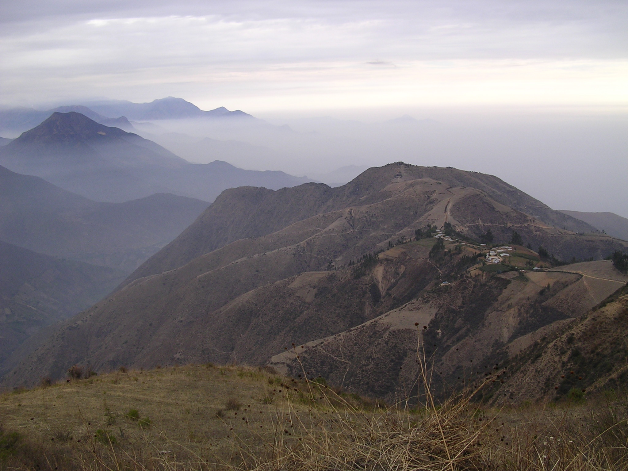 Caserío Anguy, Distrito Cáceres del Perú, Ancash, en temporada seca